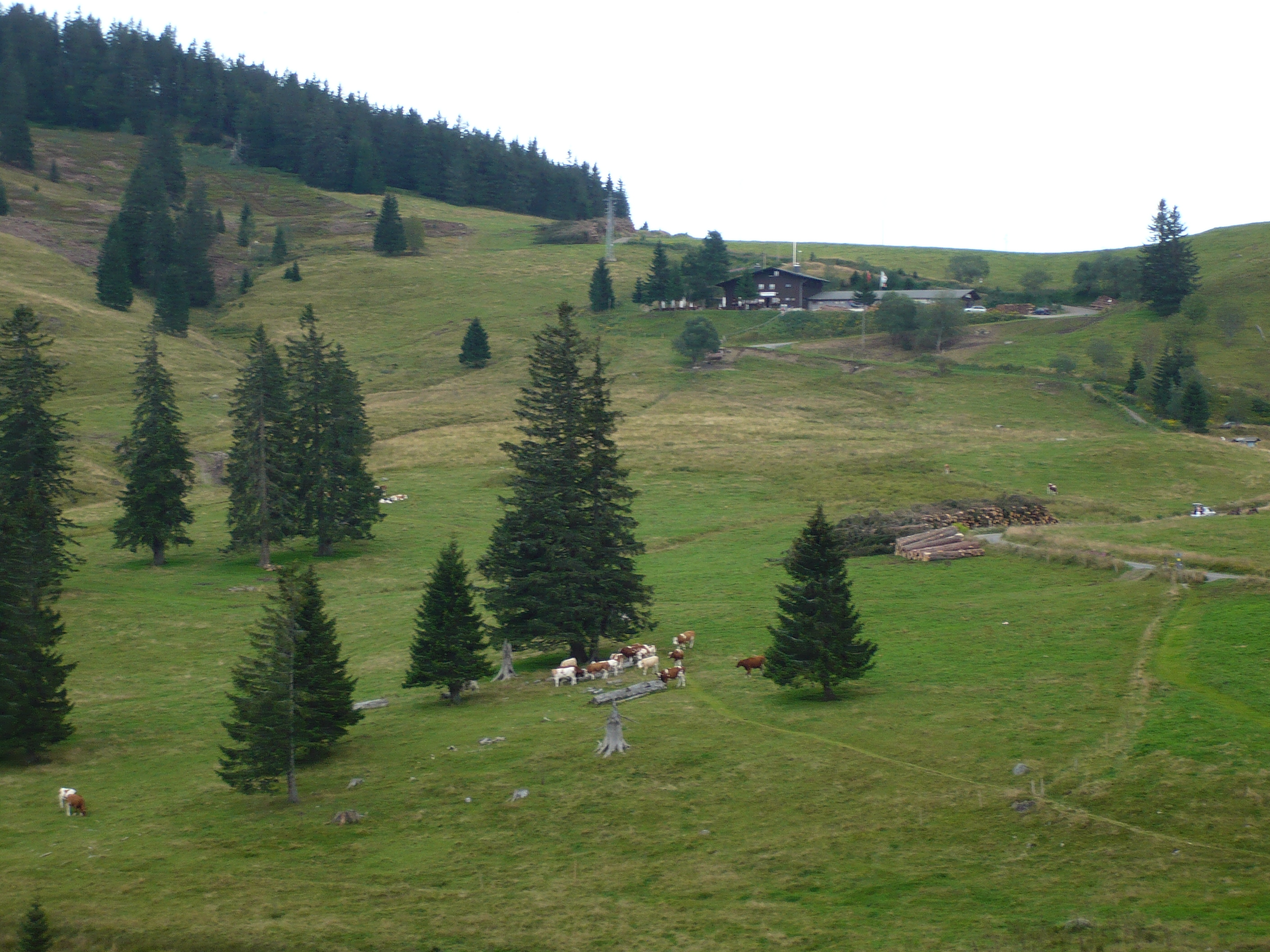 Krunkelbachhütte